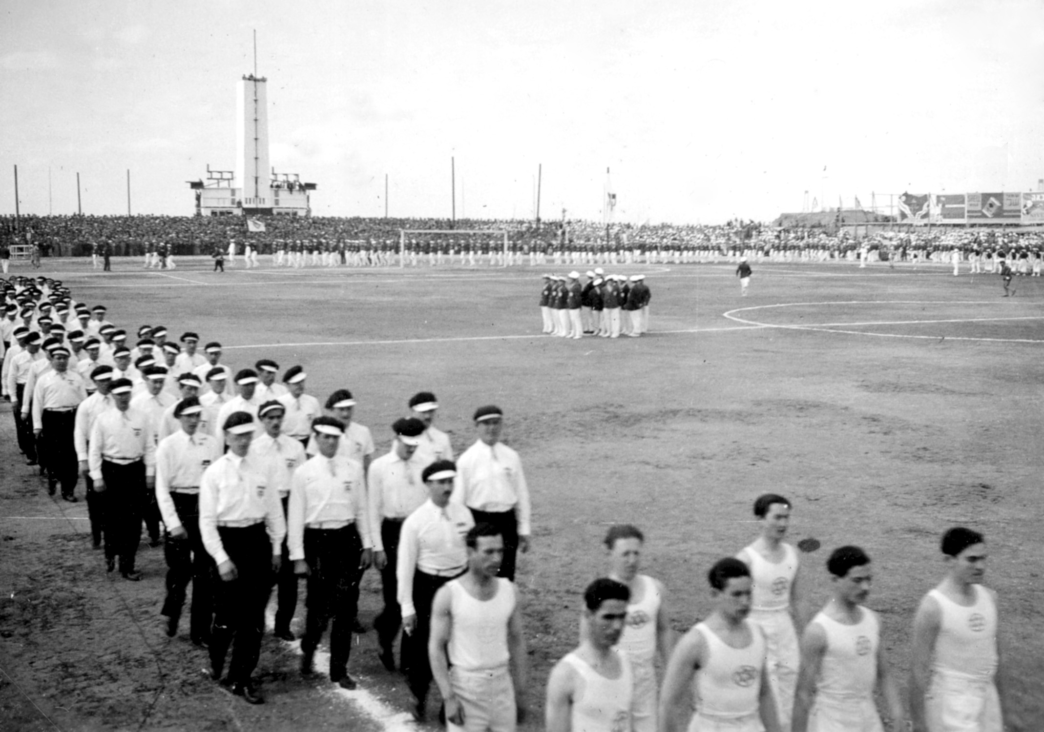 אוסף דוד עופר - המכביה השניה ; פריט מספר 79